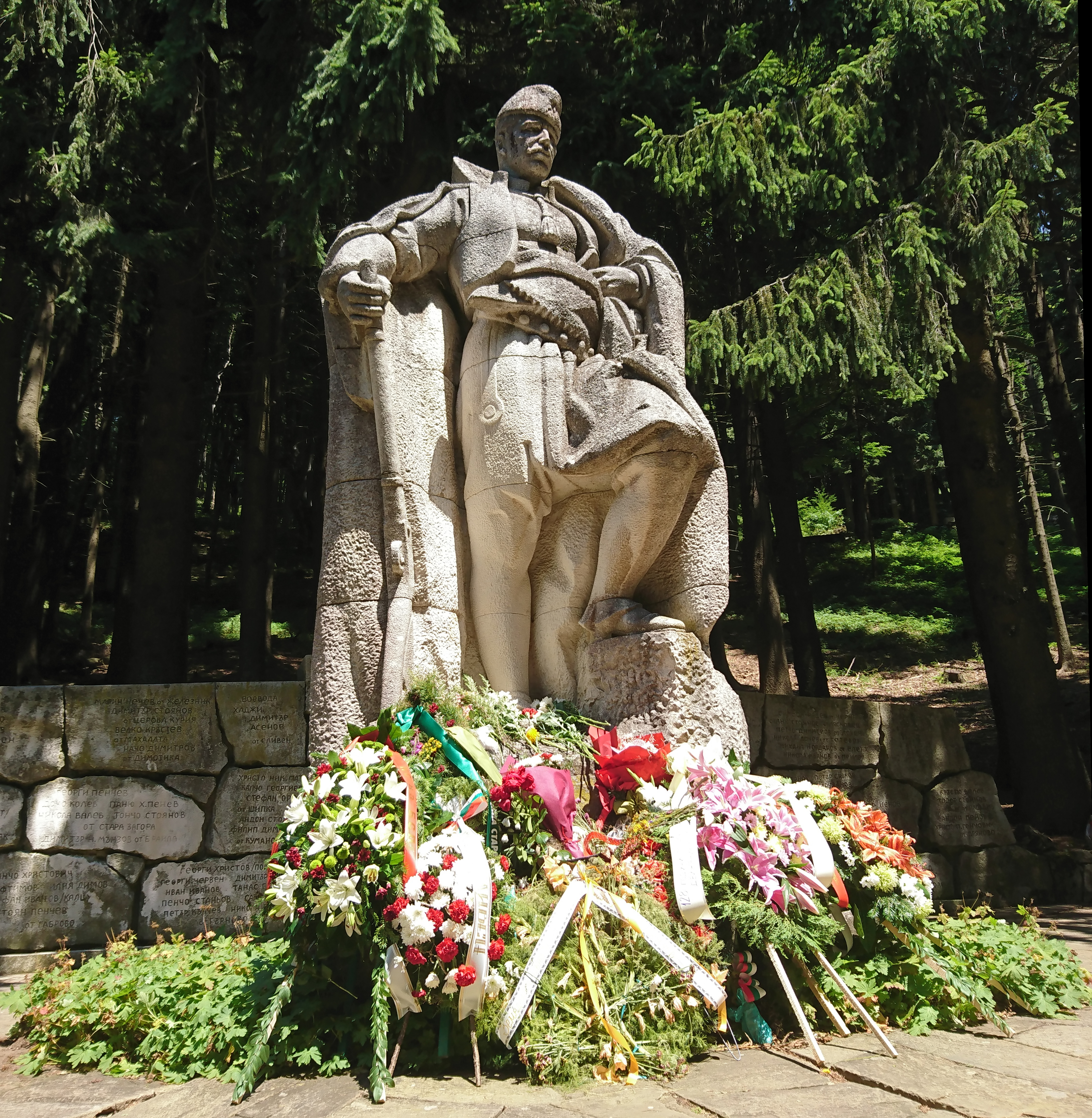 Паметника на Хаджи Димитър под едноименния връх в Стара планина.